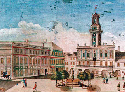 Fragment akwareli ”Widok głównego Placu Książęcego miasta Cieszyna na Śląsku” autorstwa Ignáca Chambreza